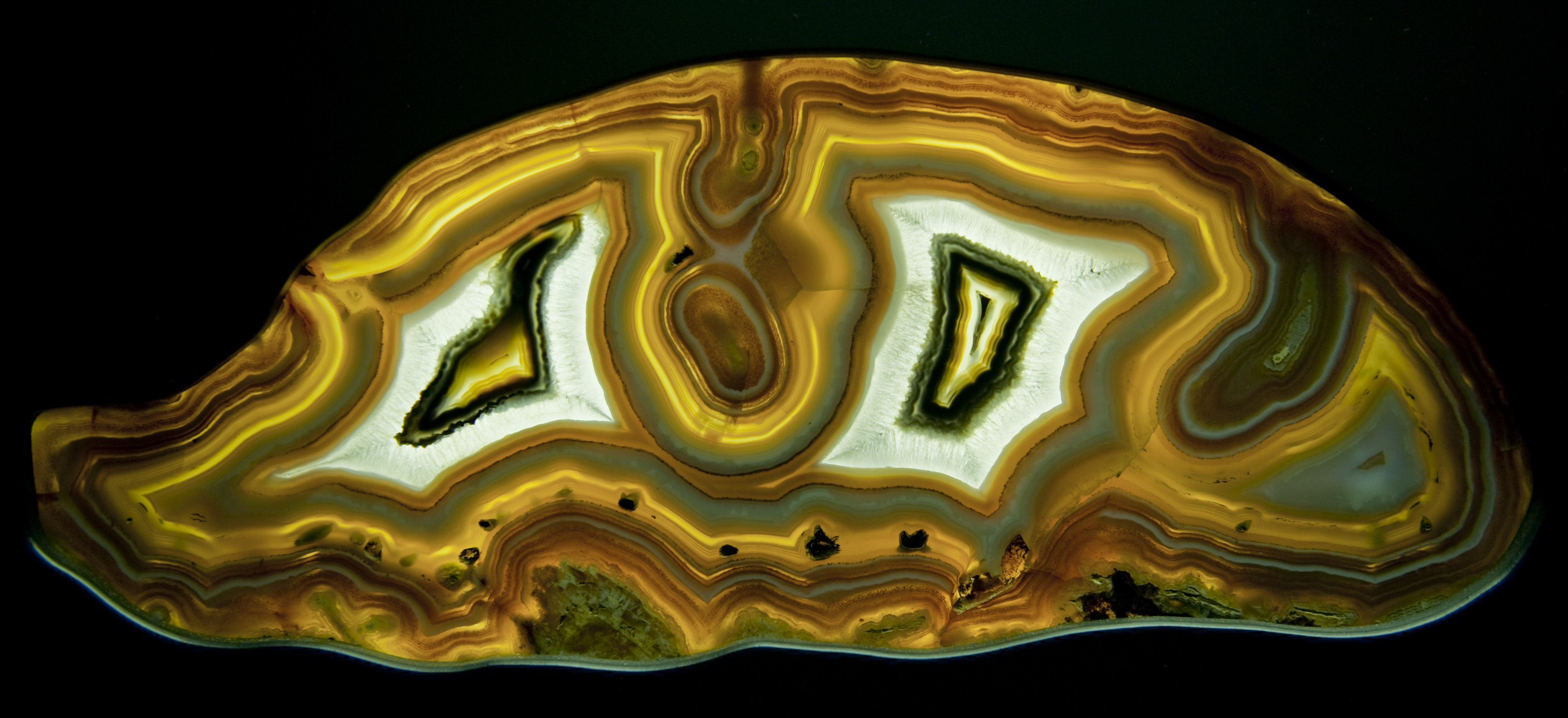 Agate, Minas Gerais, Brasil (Senckenberg Naturmuseum, Frankfurt, Germany)